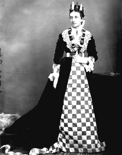 Historisches Schachkostüm (Kanada 1876)